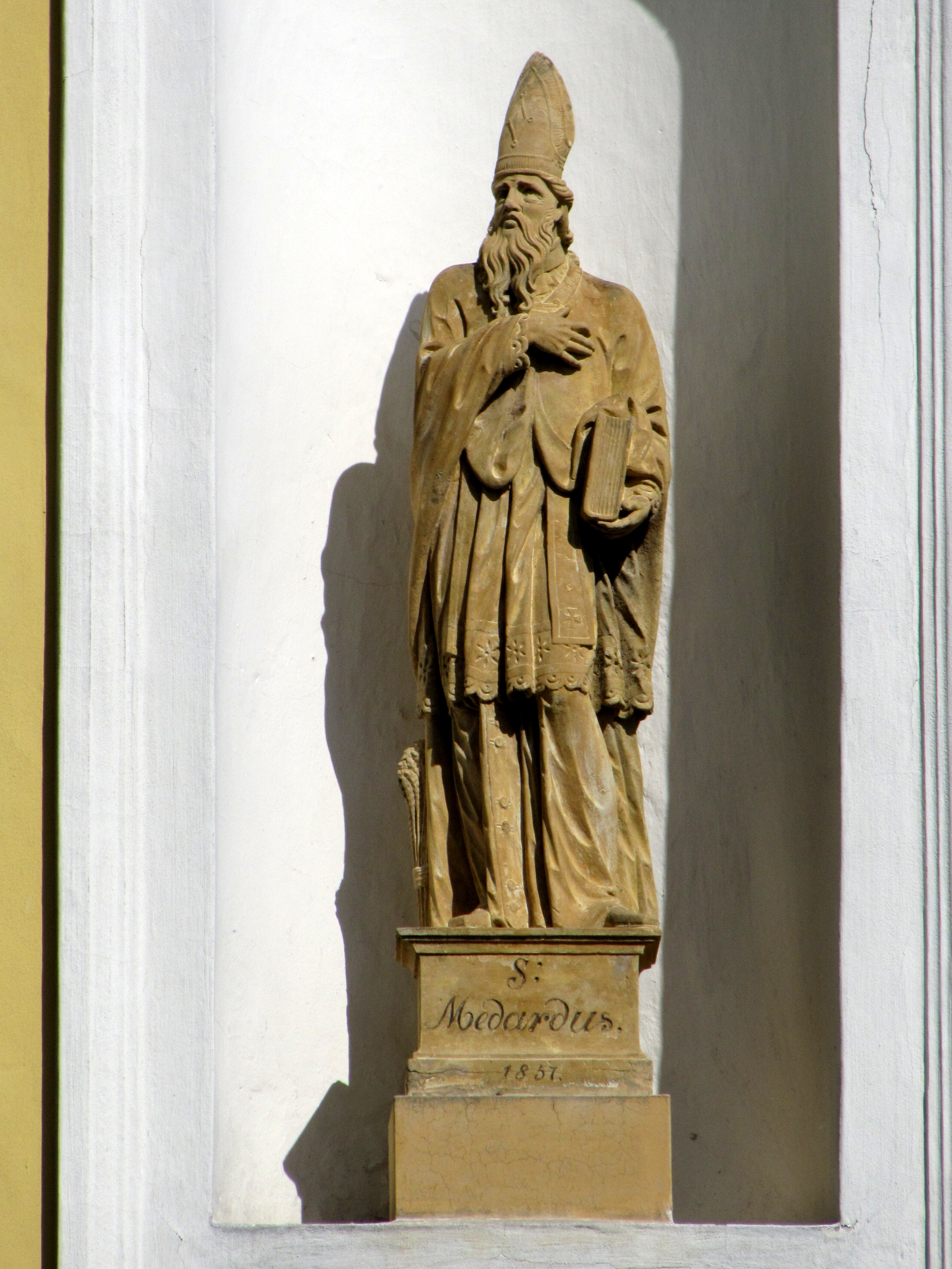 Socha sv. Medarda z roku 1857 nad vstupem do barokního kostela Všech svatých v Miloticích, okres Hodonín